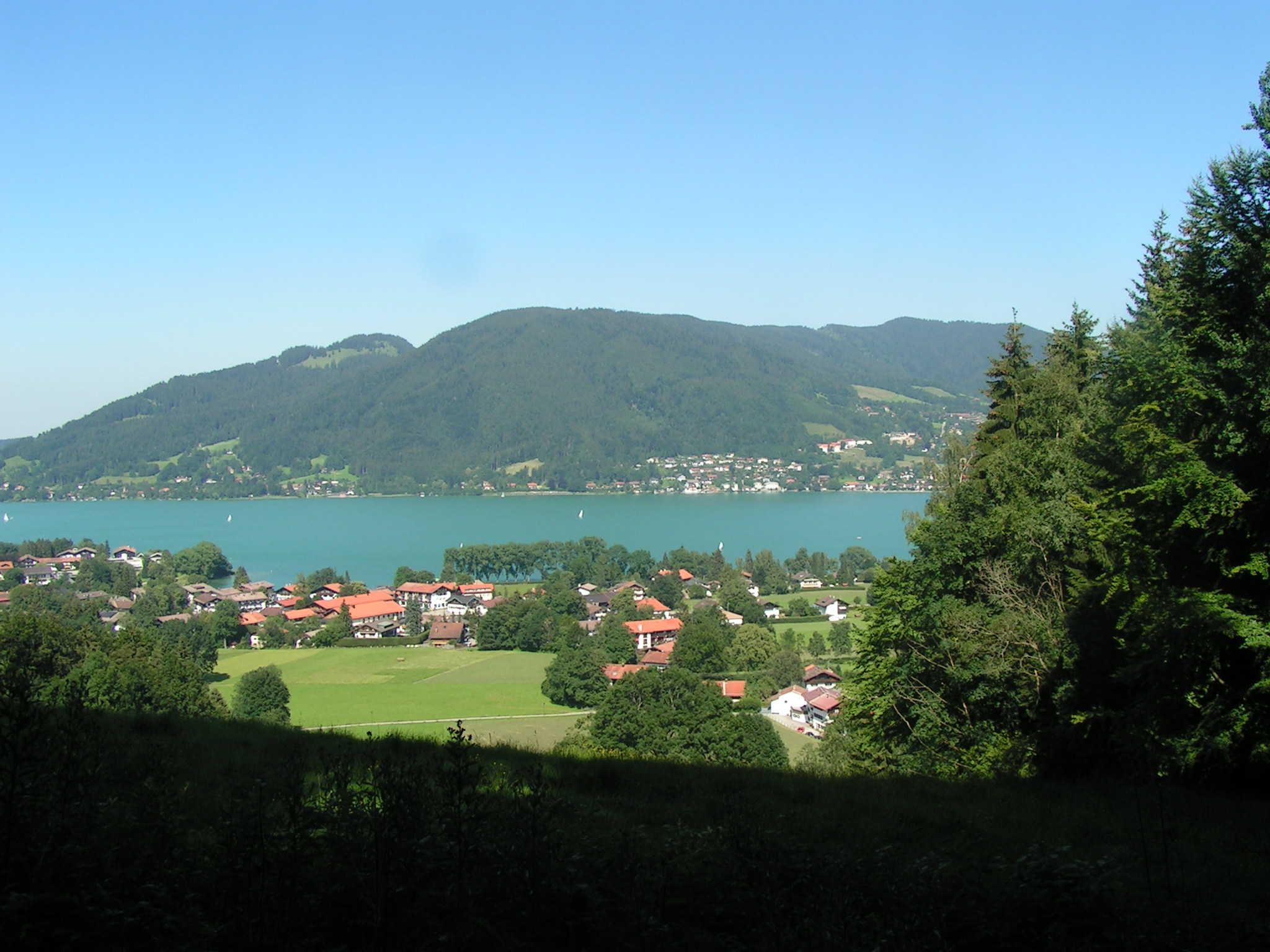 Blick auf Bad Wiessee.